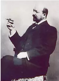 Hugo Mairich, Ingenieur